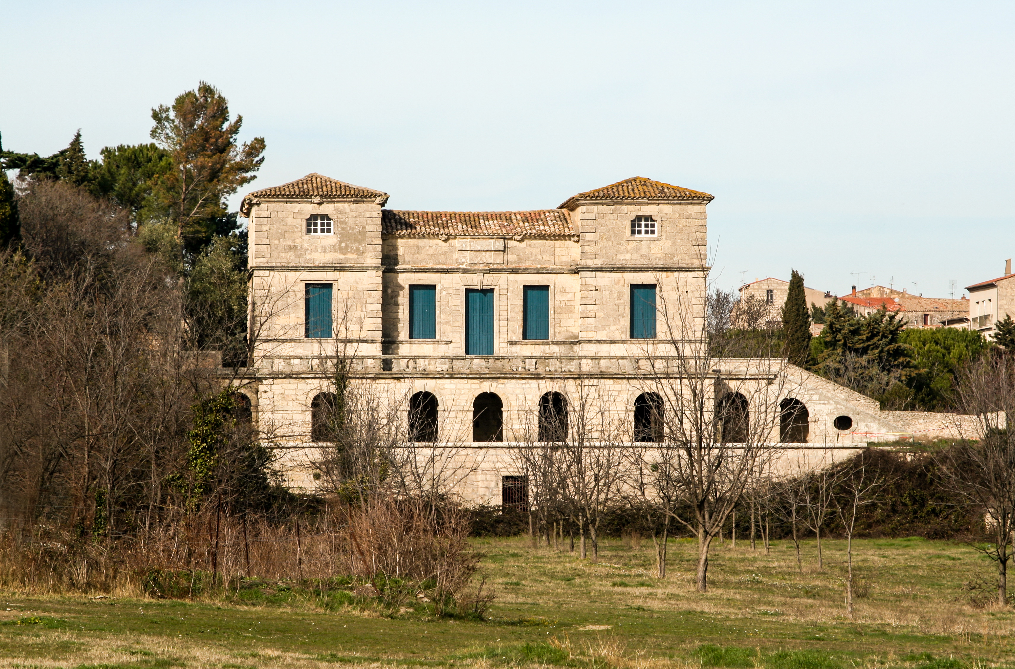 Poussan (Hérault) - château de la Garenne (XVIIe siècle).